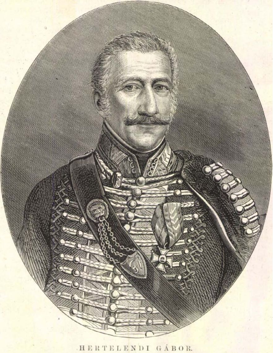 Hertelendy Gábor 1808-ban (a forrás szerint készült abban az évben a rajz)